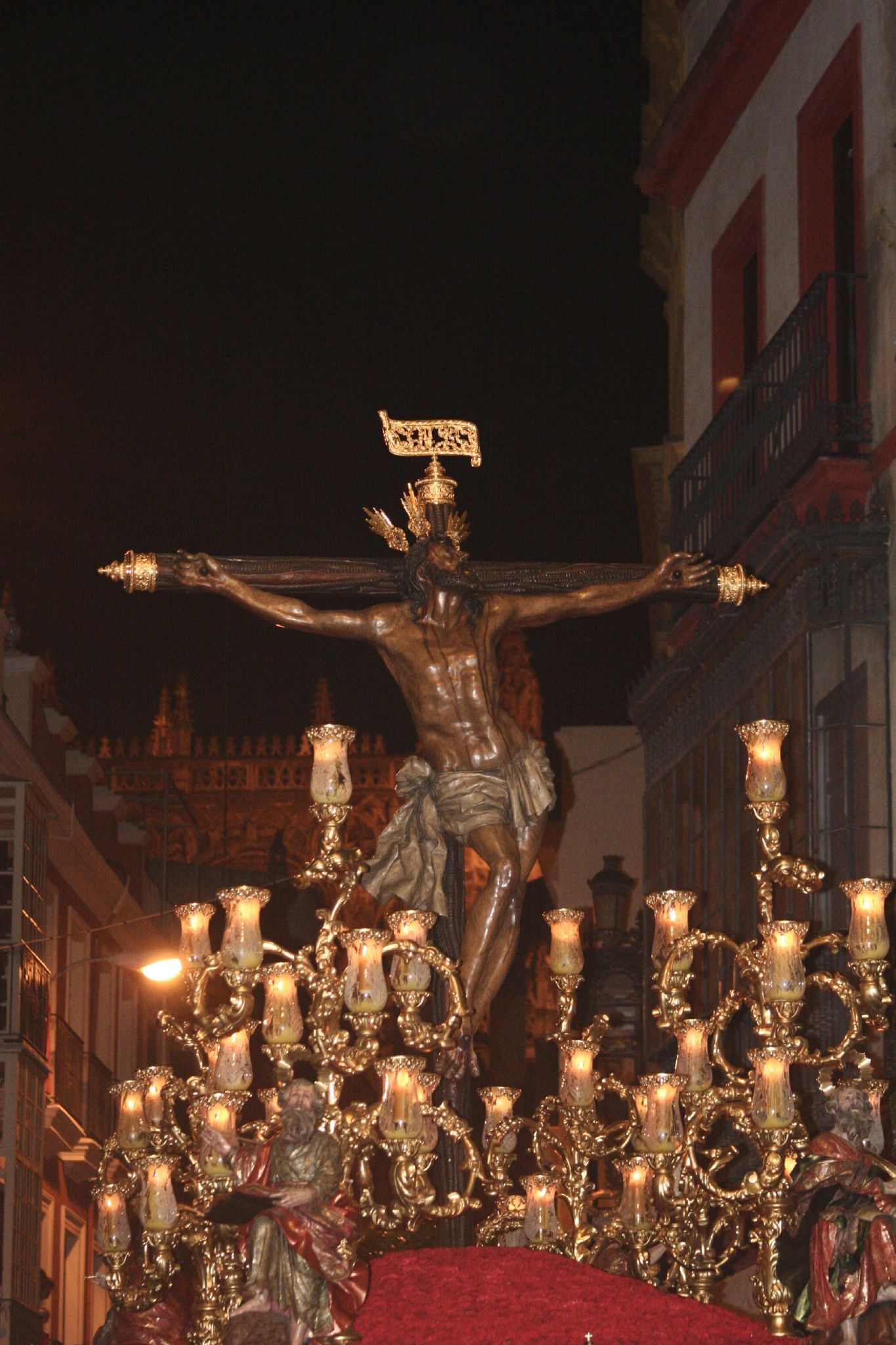 Sagrada Expiración de Nuestro Señor Jesucristo. Semana Santa en Sevilla. Año 2006. La imagen del Cristo de la Expiración fue tallada en el año 1575 por el escultor Marcos Cabrera. Foto realizada y propiedad de Ángel Cachón